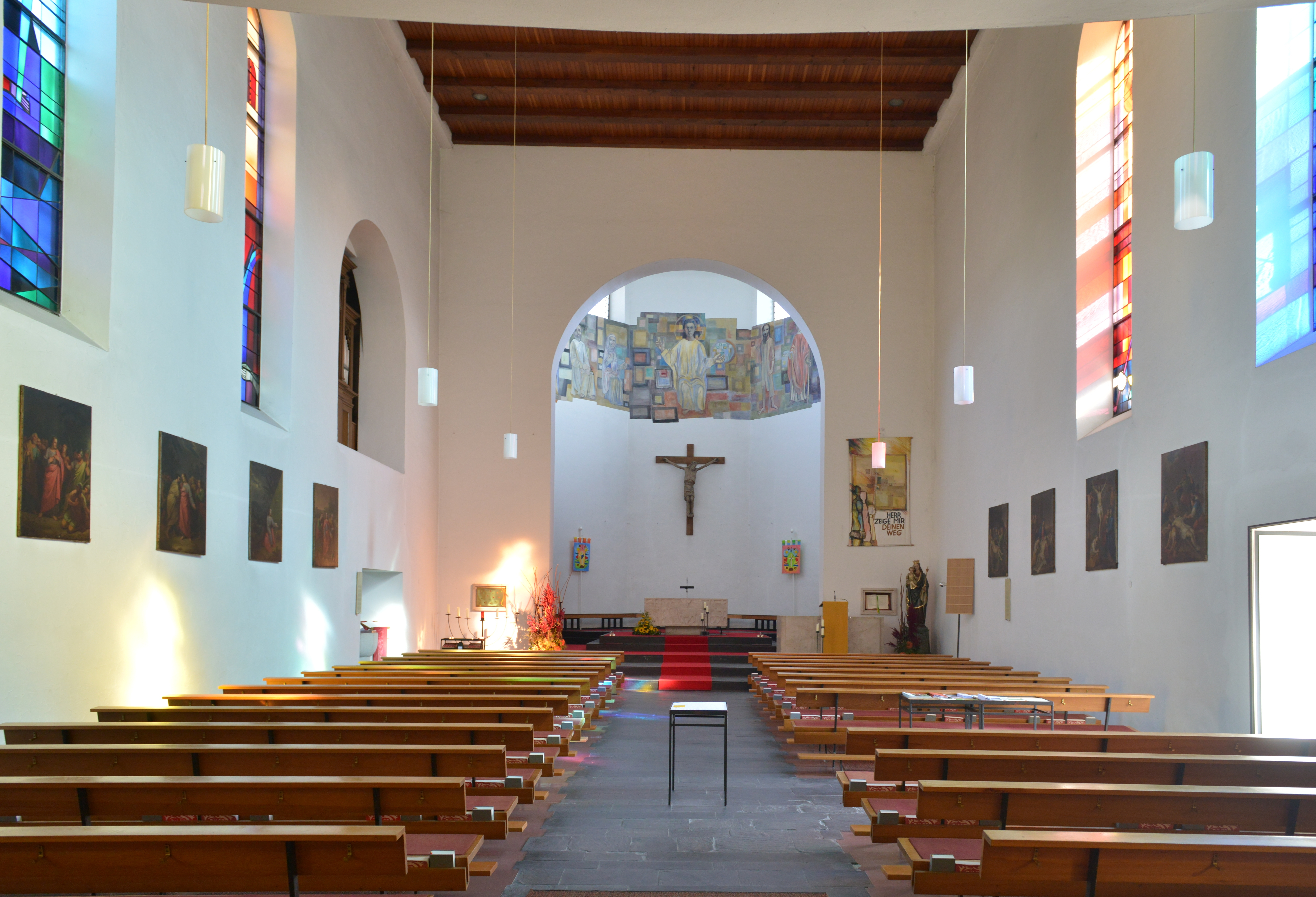 Pfarrkirche hll. Pankratius und Zeno im Ortsteil Altenstadt in Feldkirch. Sie ist baulich an die Dominikanerinnenkirche und Kloster nördlich verbunden.